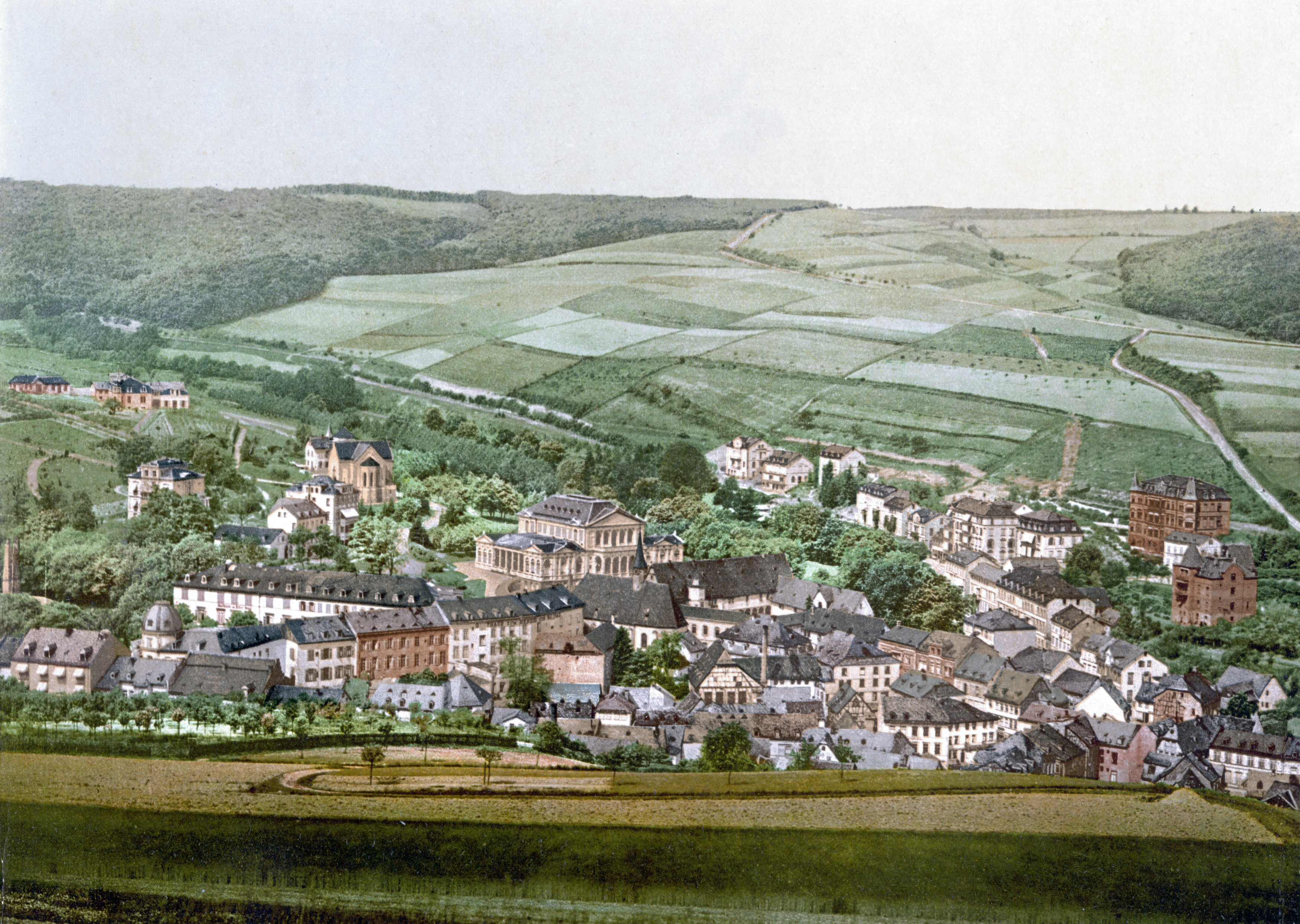 Bad Langenschwalbach